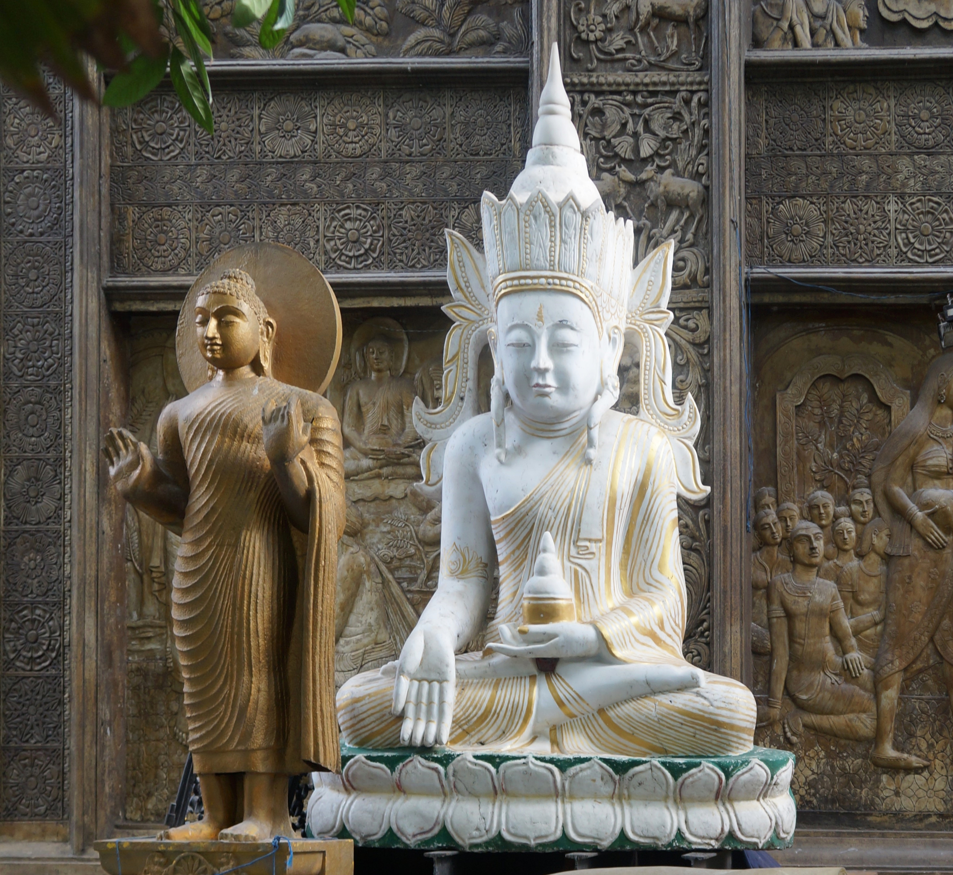 Gangaramaya_Temple.-Colombo,au Sri Lanka.- Asie du Sud